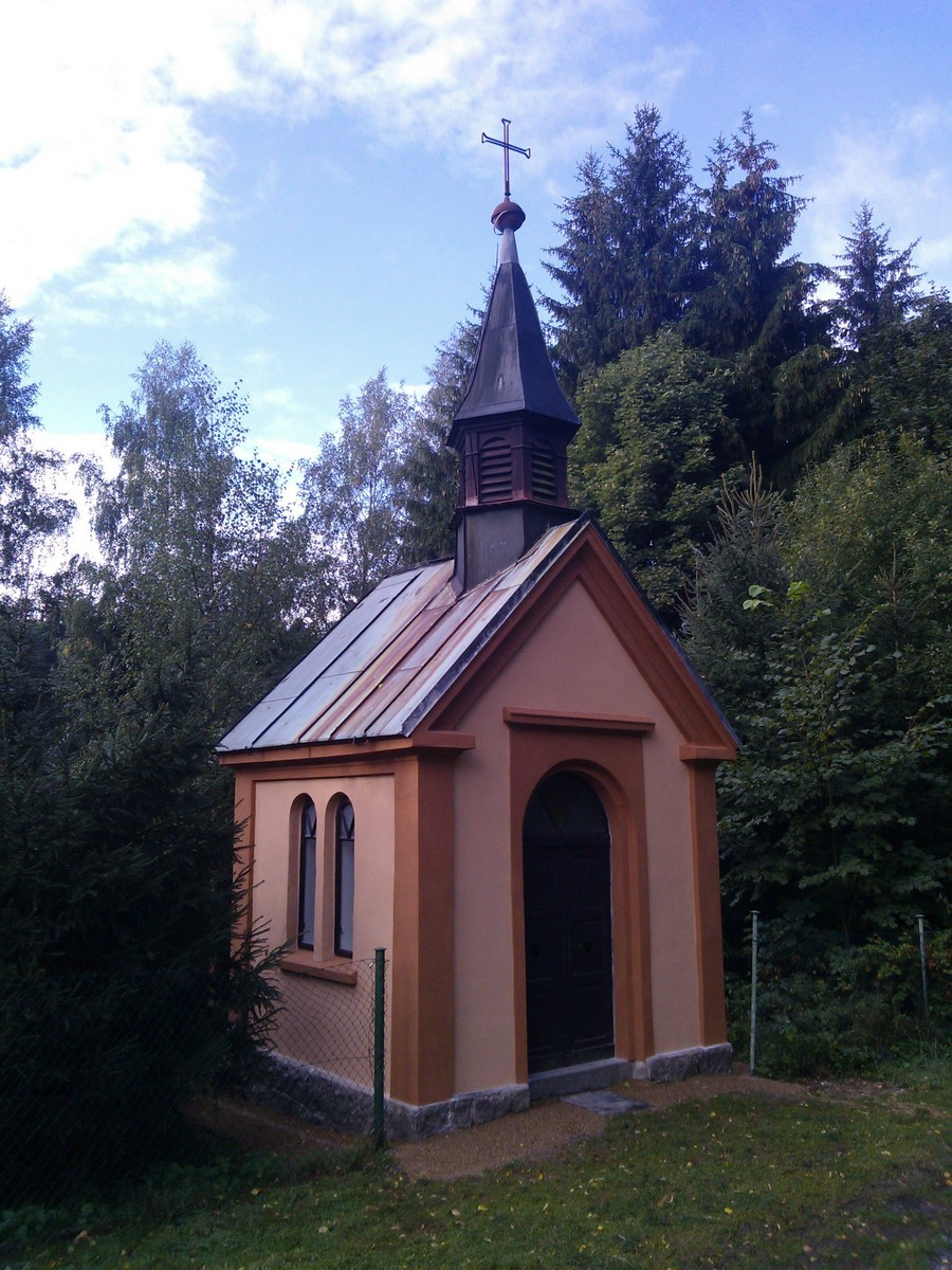 Kaple Panny Marie na Tomášově po rekonstrukci (2015)